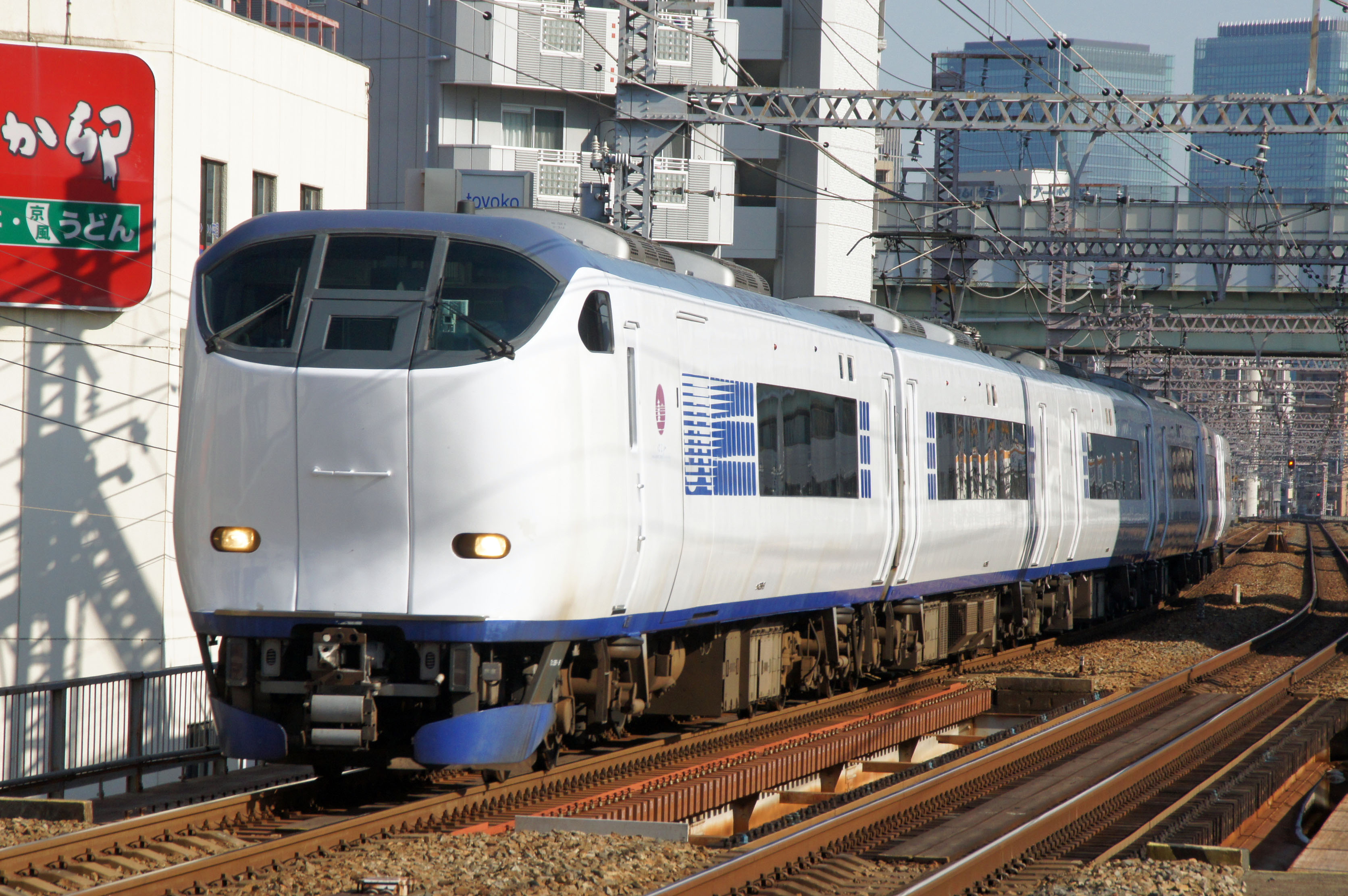 JR西日本 281系（梅田貨物線）